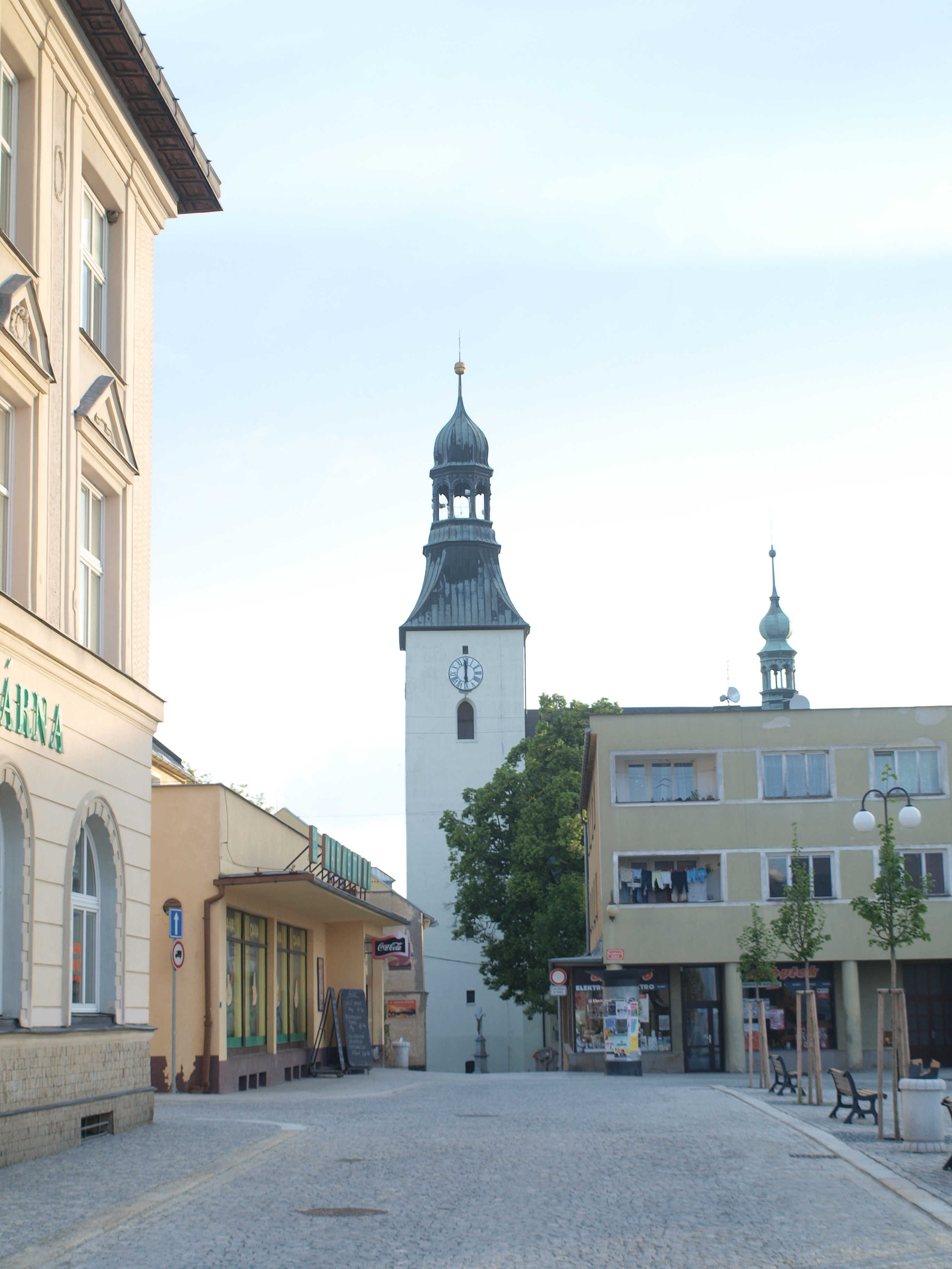 Kostel sv. archanděla Michaela v Rýmařově, pohled z náměstí Míru.